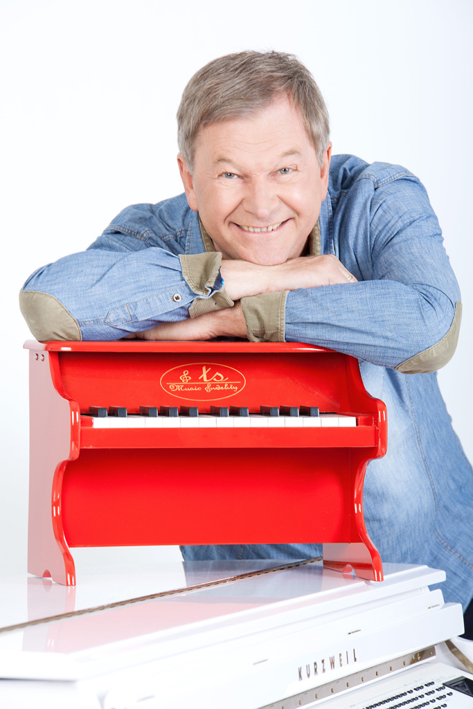 Kinderliedermacher Reinhard Horn